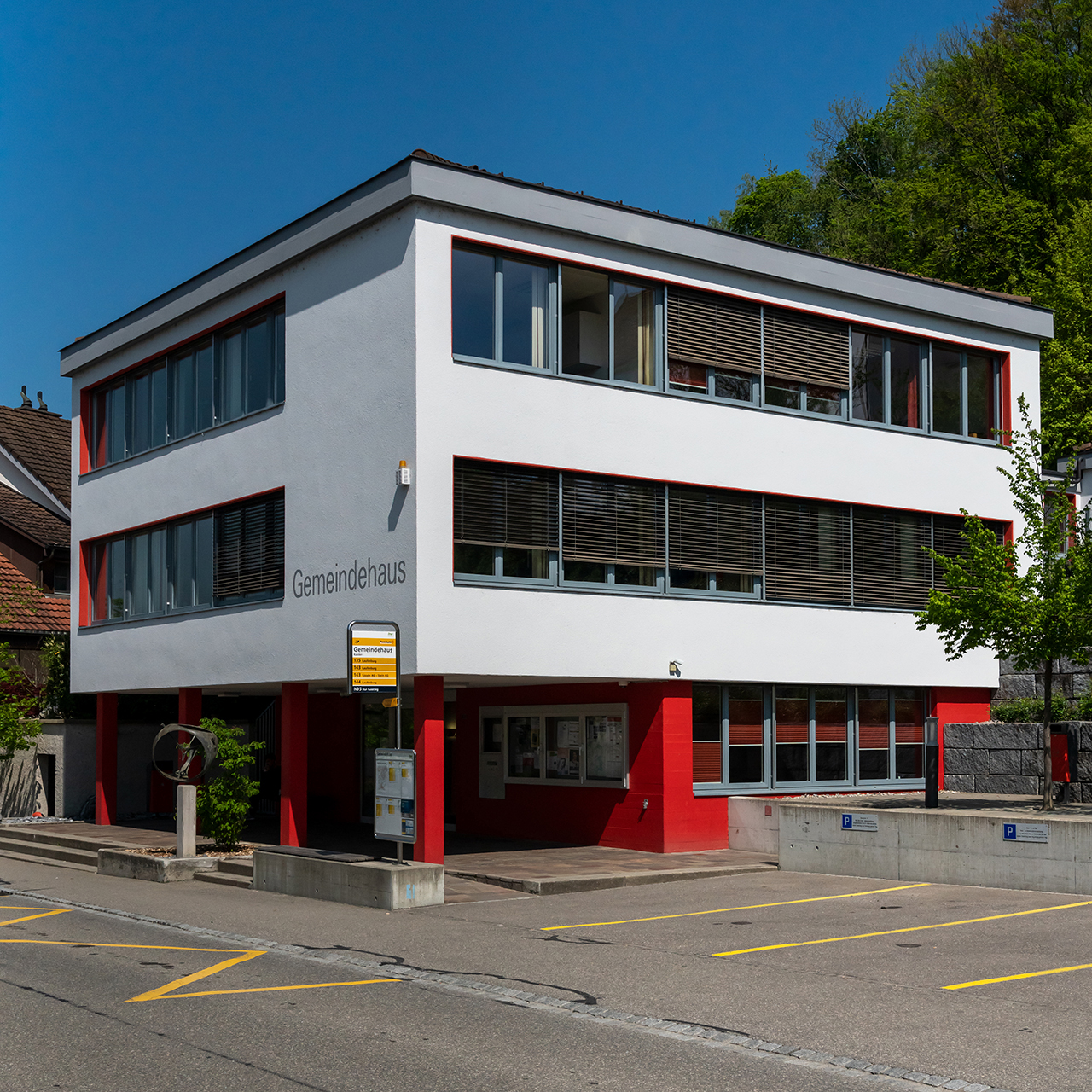 Gemeindehaus und Bushaltestelle in Kaisten (AG)